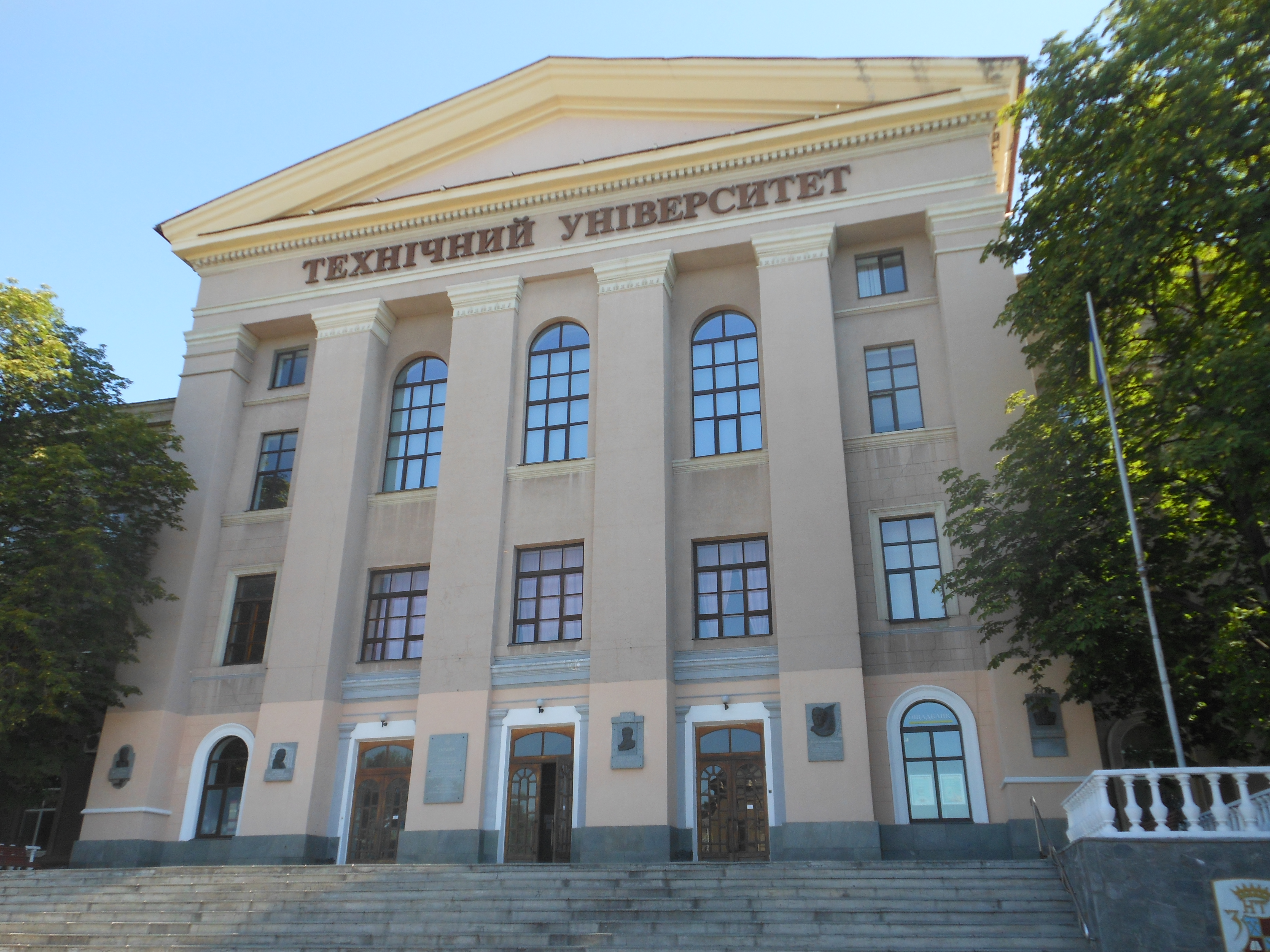 Механіко-технічне училище (зараз ЗДТІ), архітектор Р. Марфельд, в якому навчався Чубар В.Я., Запоріжжя, вул. Жуковського, 64/62